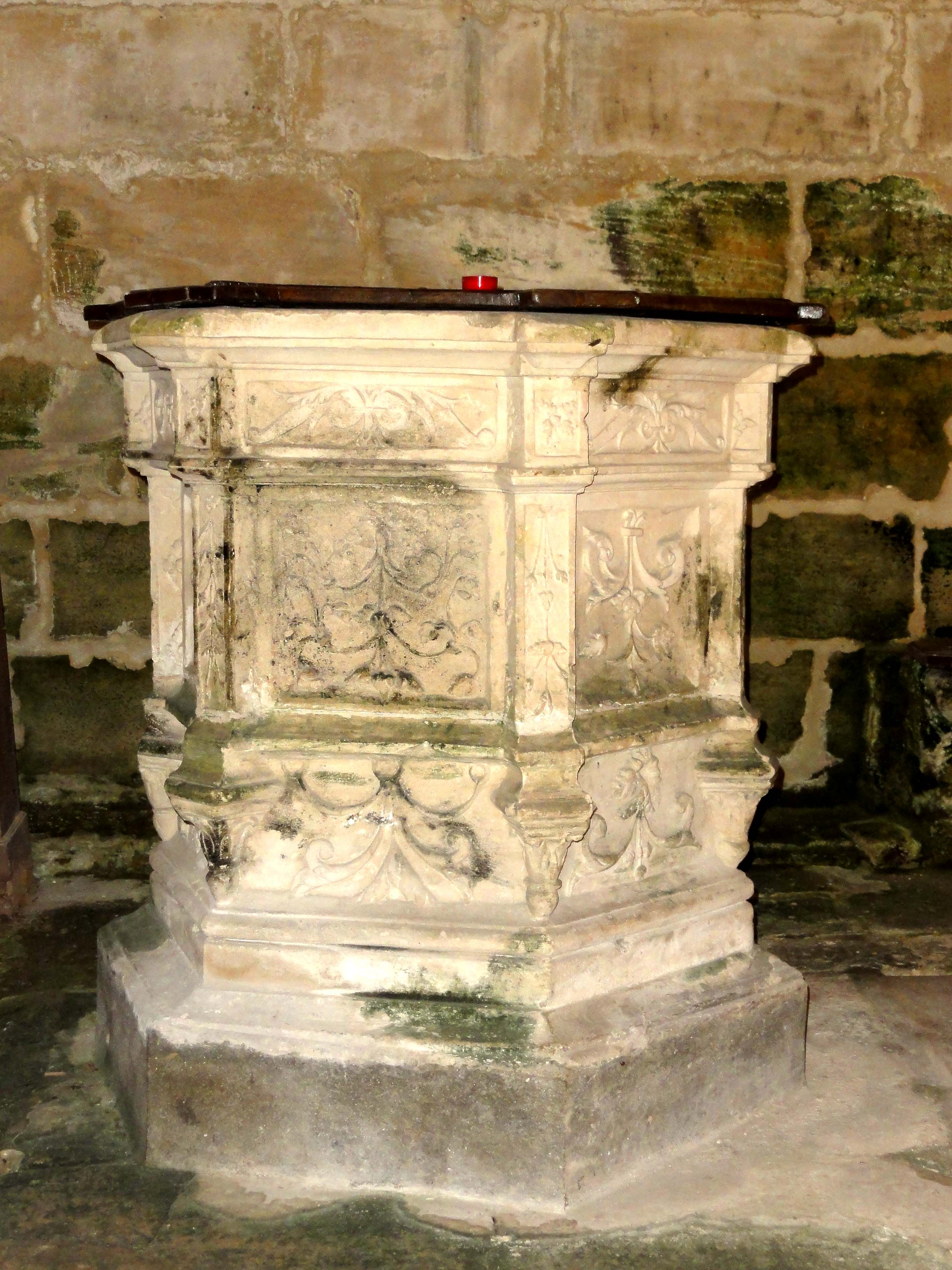 Fonts baptismaux du XVIe siècle.